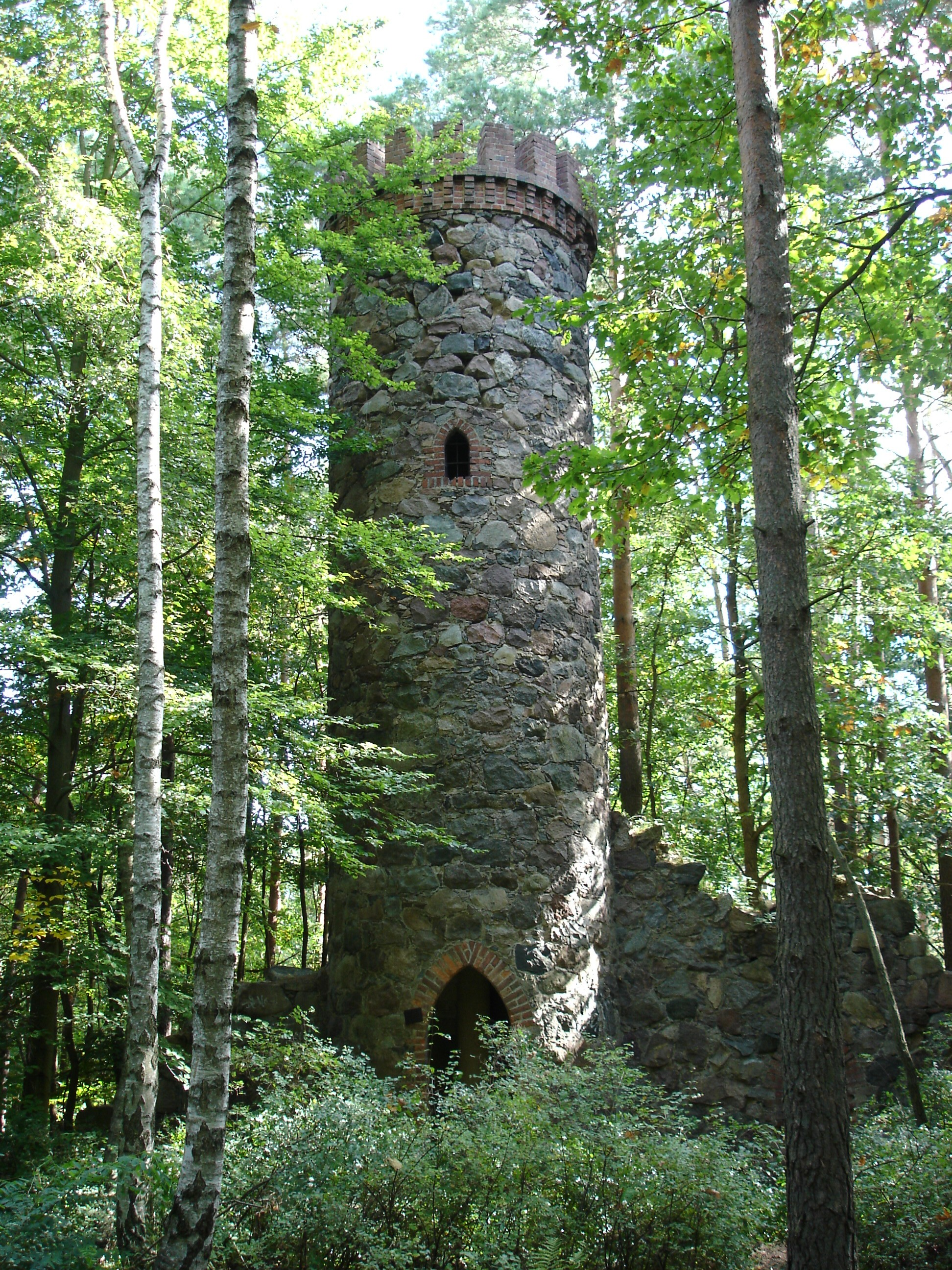 Aussichtsturm in Mostki